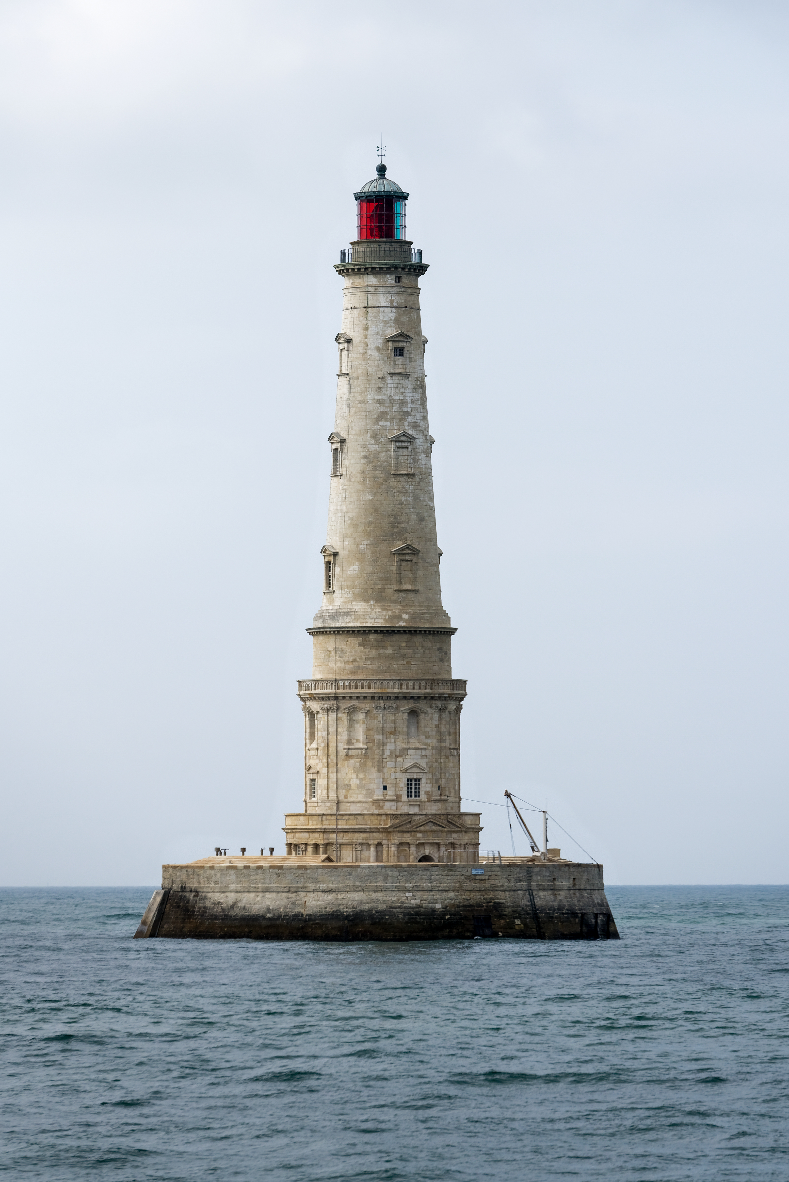 Phare de Cordouan. Vue depuis un bateau d'excursion. Estuaire de la Gironde (Gironde, Nouvelle-Aquitaine, France). This building is indexed in the Base Mérimée, a database of architectural heritage maintained by the French Ministry of Culture, under the references PA00083858 and IA33001224 .